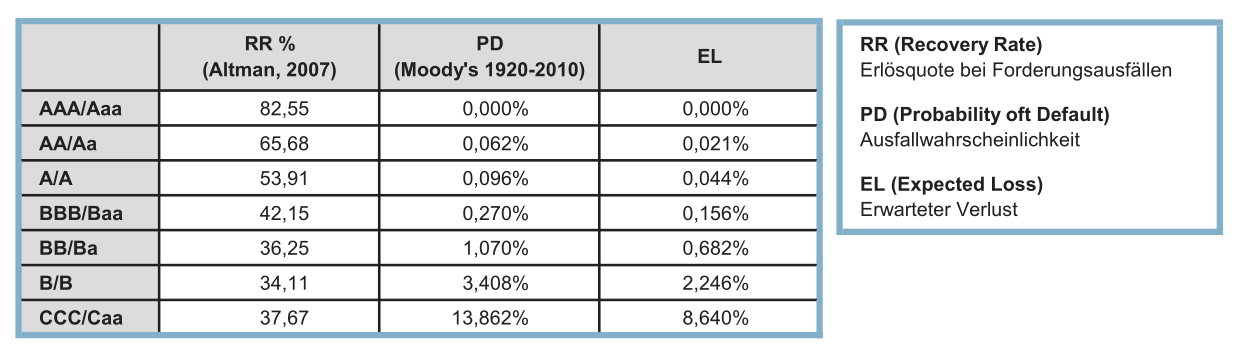 Rating und Ausfallwahrscheinlichkeit in einer Tabelle zusammengefasst